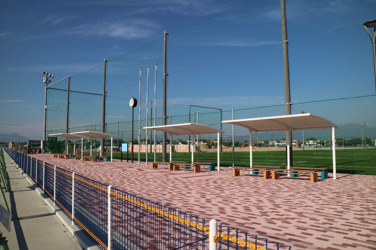 Basa Jawa: 前橋サッカーセンター(仮称) 2016年12月現在